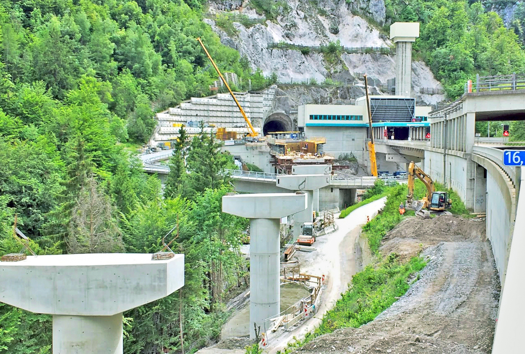 Konstruktion der Autobahnbrücke zum nördlichen Ostportal des Karawankentunnels